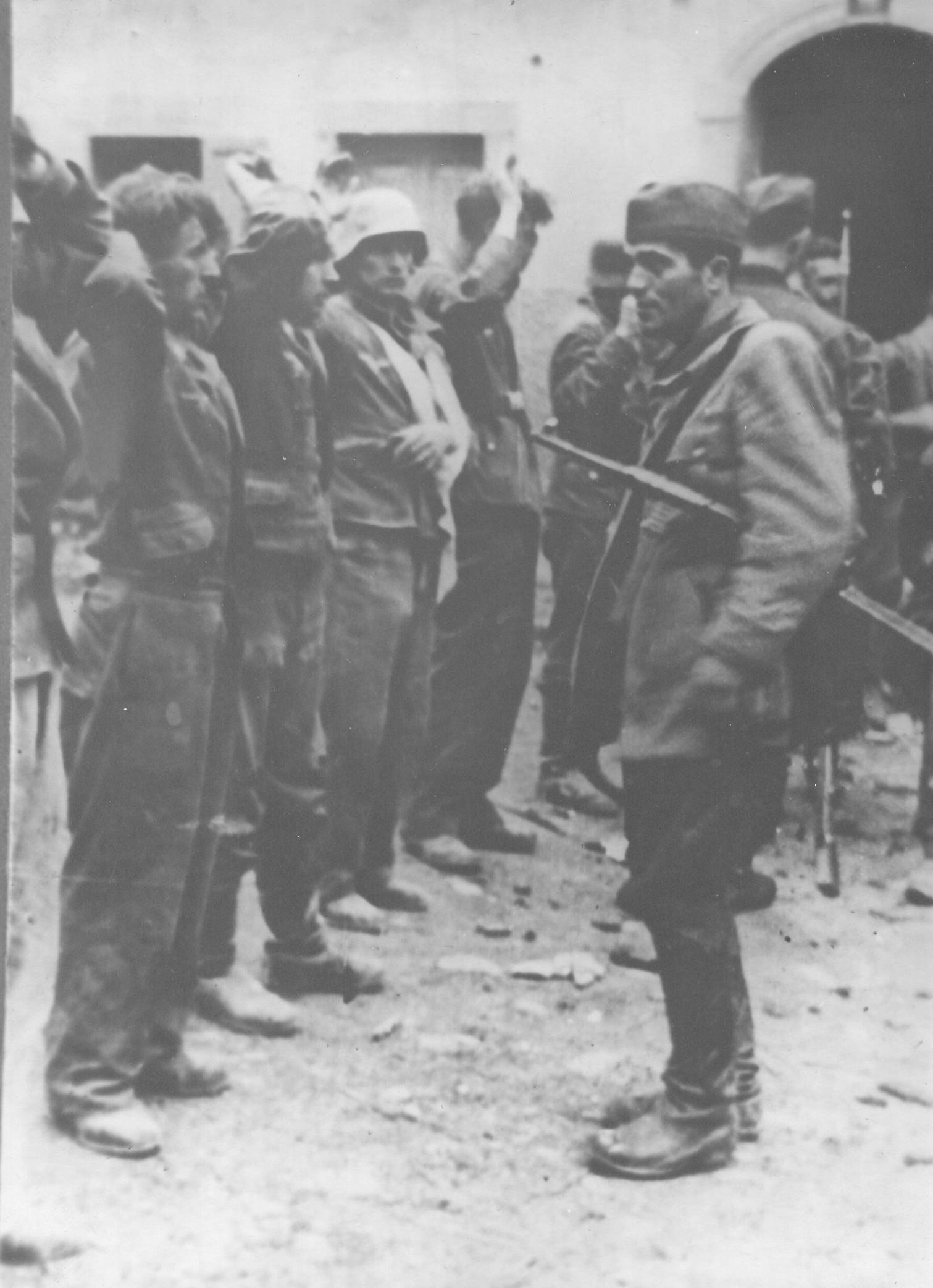 Petar Brajović pregleduje vojne ujetnike